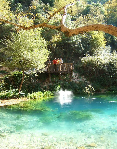 Karstquelle „Syri i Kalter“ (Blue Eyes) bei Delvina in Südalbanien Decius